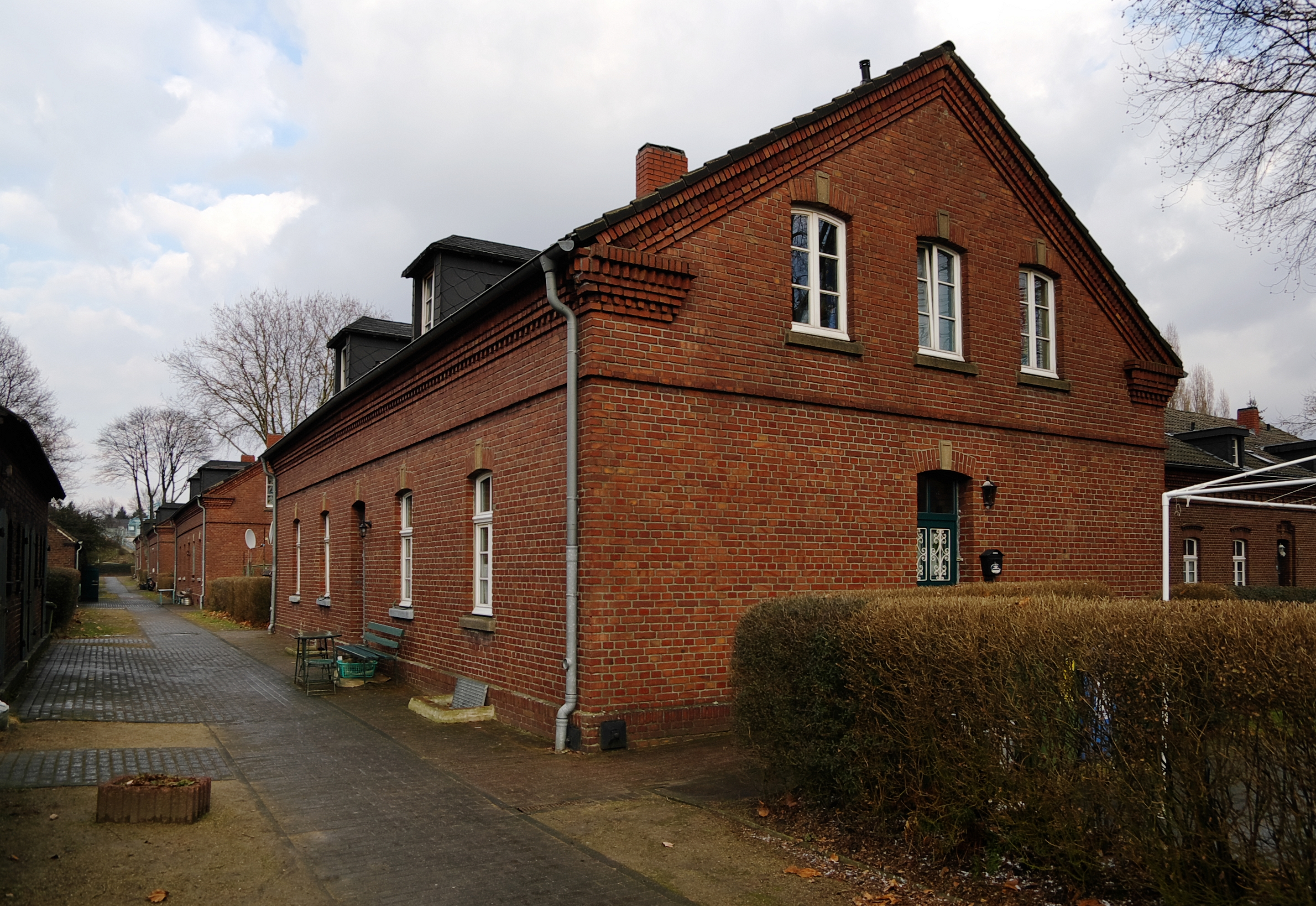 Oberhausen, Siedlung Eisenheim.